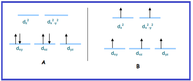 Paulin eta Hunden printzipioak